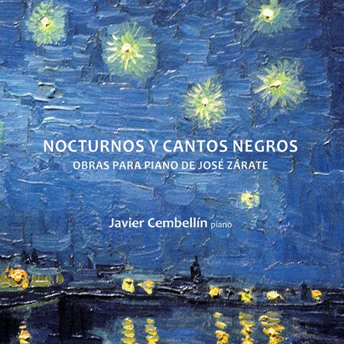 CD "Nocturnos y Cantos negros"; editado por Several Records